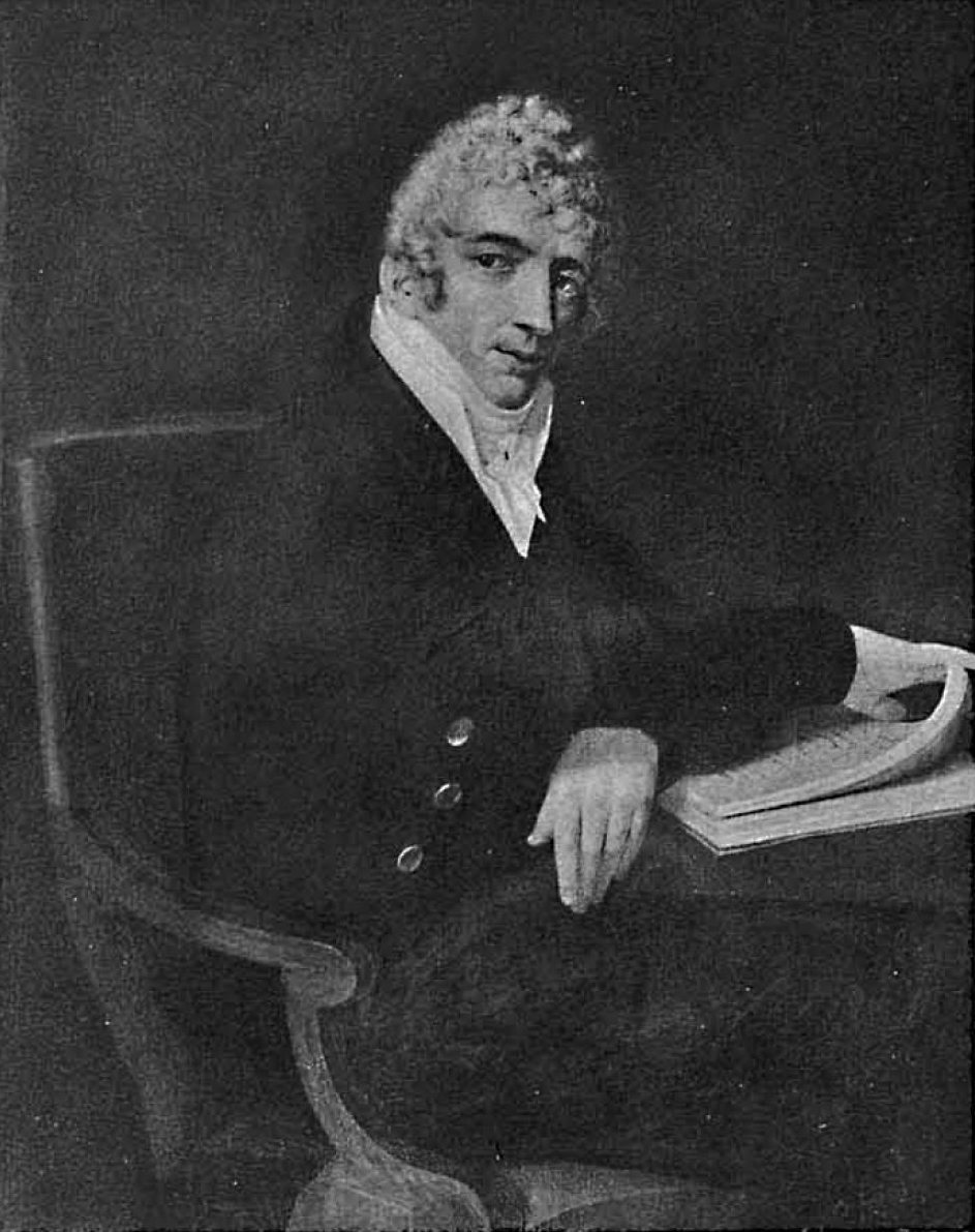 Граф Иван Степанович Лаваль (1761-1846), тайный советник, был женат на богатой наследнице Александре Григорьевне Козицкой (1772-1850).